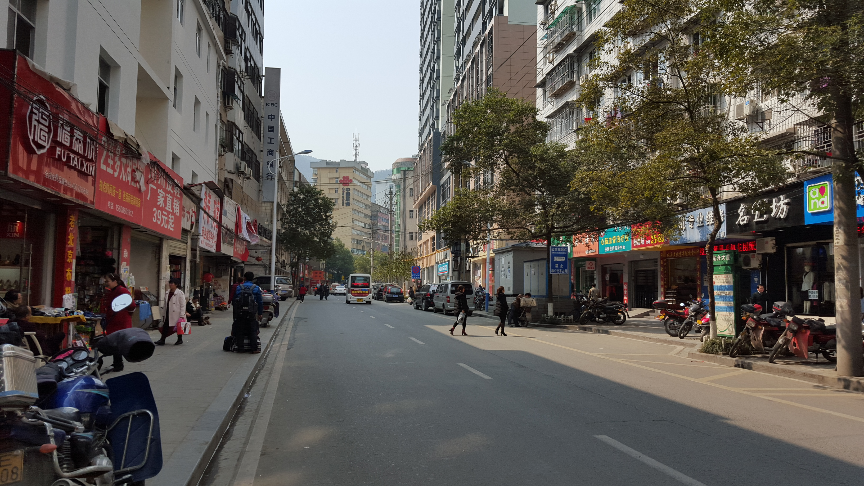 长阳土家族自治县龙舟大道